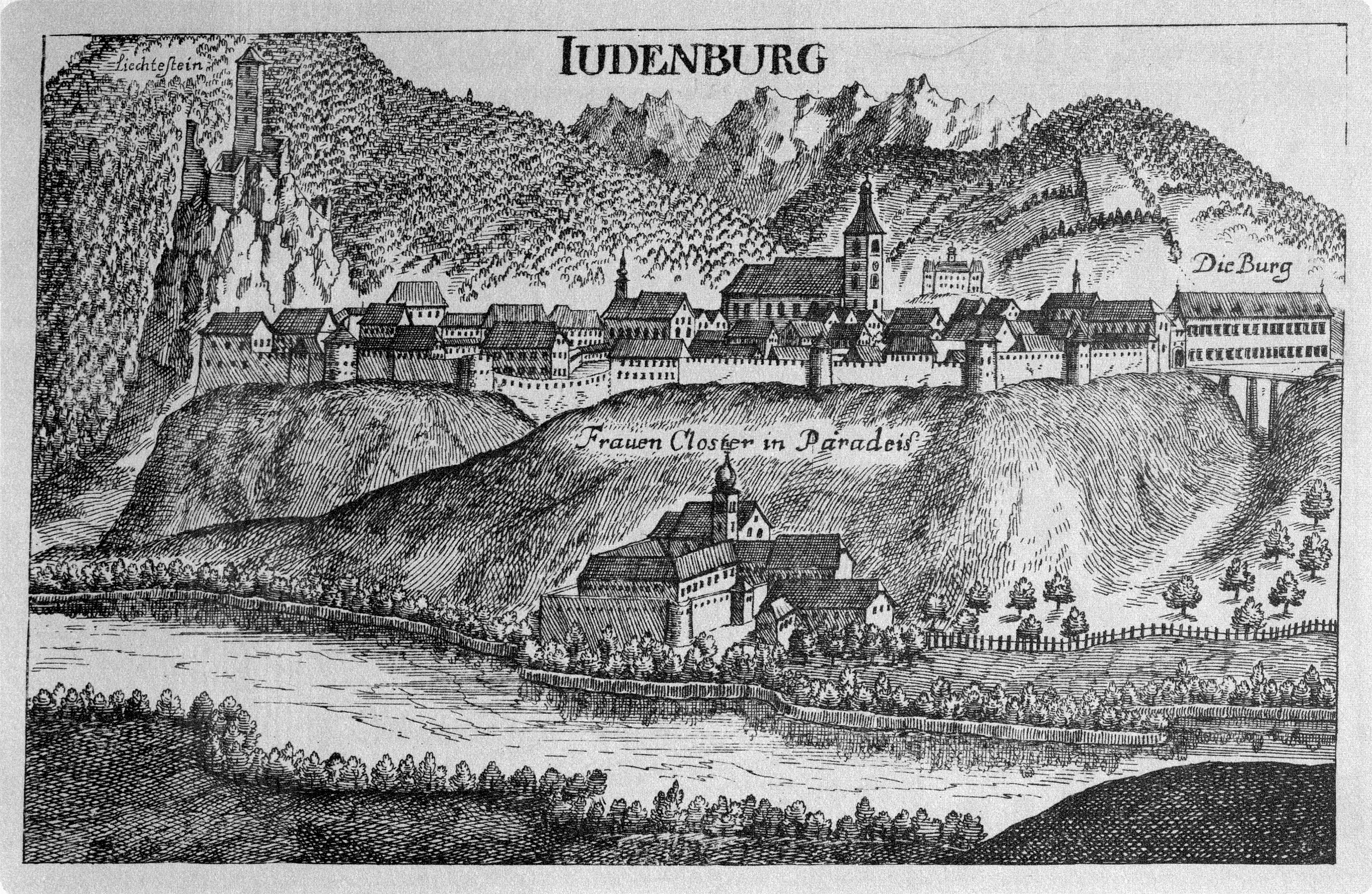 G. M. Vischers Käyserlichen Geographi, Topographia Ducatus Stiriae, Das ist: Eigentliche Delineation / und Abbildung aller Städte / Schlösser / Marcktfleck / Lustgärten / Probsteyen / Stiffter / Clöster und Kirchen / so es sich im Herzogthumb Steyrmarck befinden; Und anjetzo Umb einen billichen Preyß zu finden seynd Bey Johann Bitsch Universitäts Buchhandlern / Auff dem Juden=Platz bey der guldenen Saulen. Graz 1681 Die Nummerierung der Dateien folgt der alphabetischen Reihung der Ortsnamen